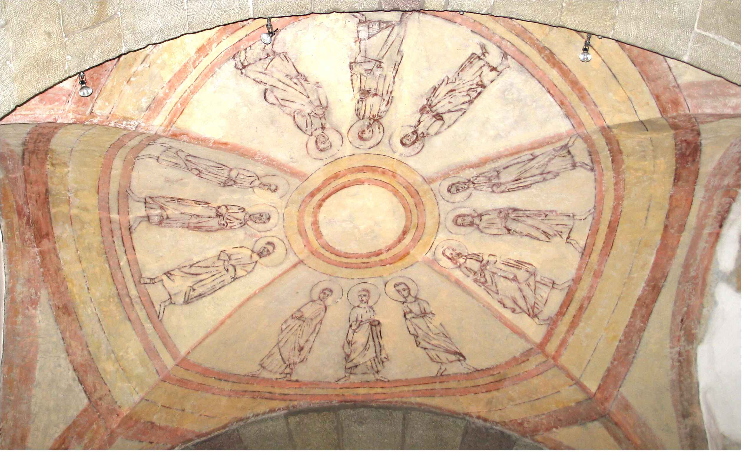 Molereien um Plafong an der Kapell op der Giischterklaus. Kategorie:Gemeng Rouspert Giischterklaus